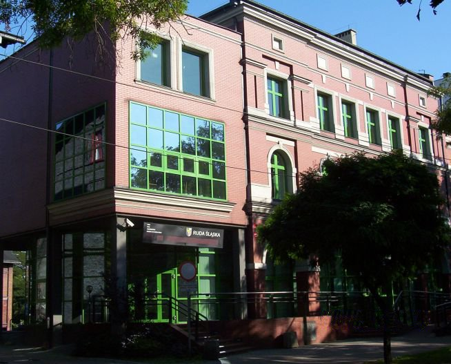 Ruda Śląska Nowy Bytom - budynek B Urzędu Miasta.